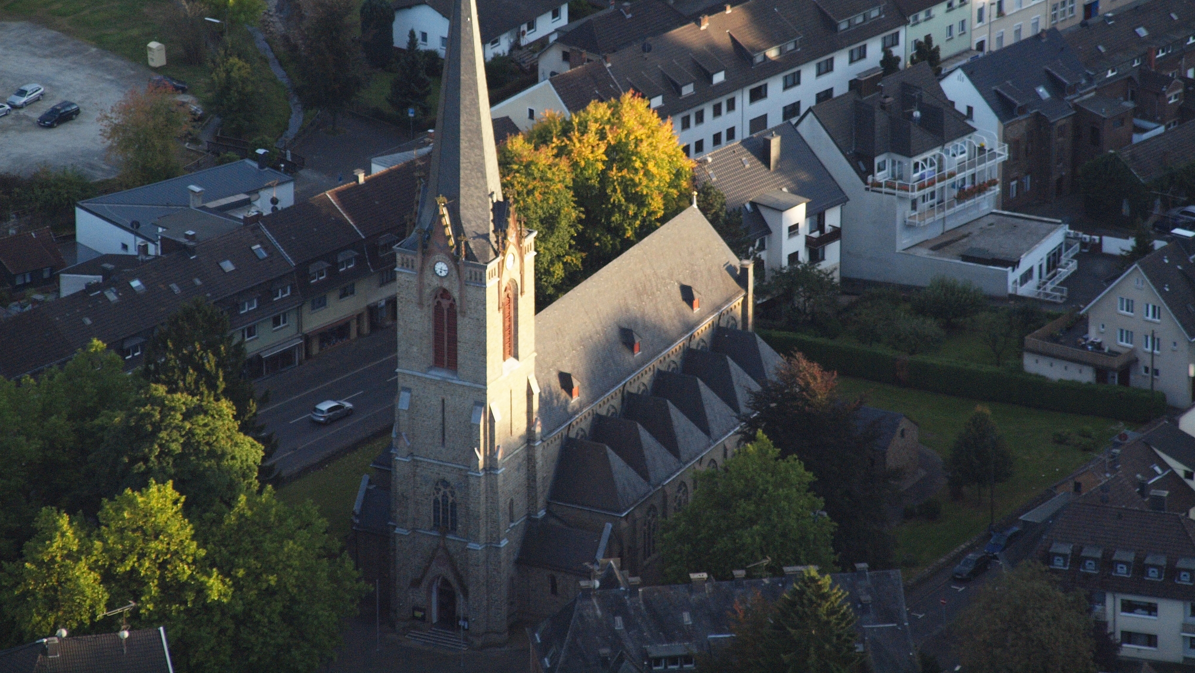 St. Patricius, Eitorf: Luftaufnahme